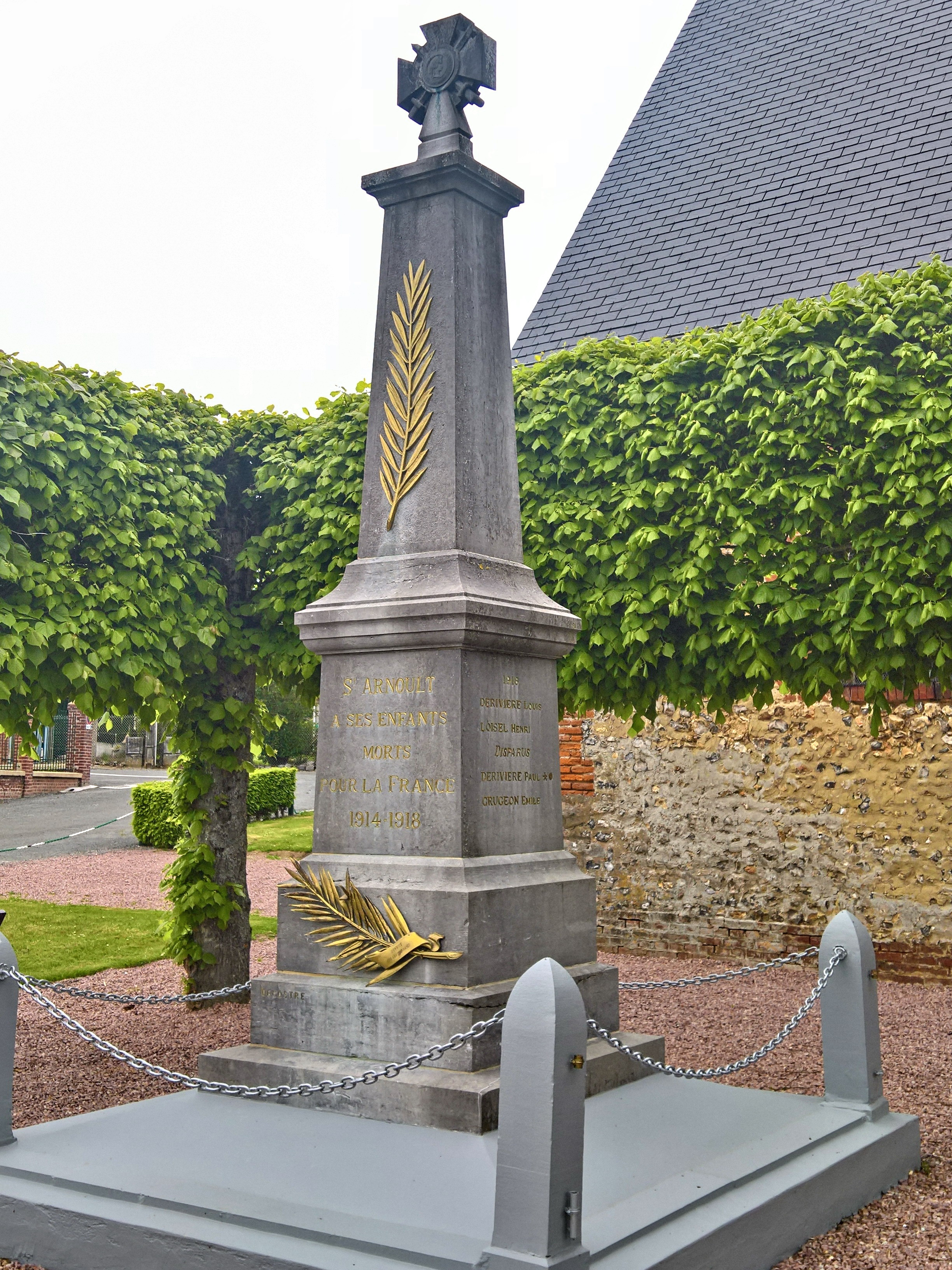 Saint-Arnoult (Oise) : Monument aux morts